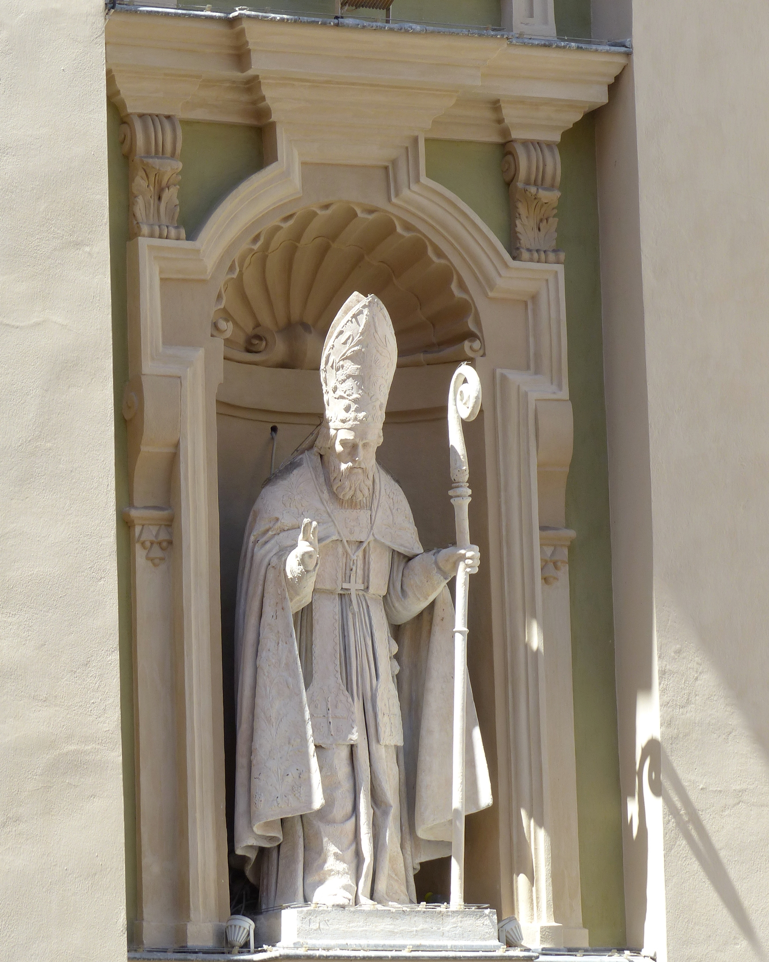 Nice (Alpes-Maritimes, France), cathédrale Ste Réparate, façade orientale, l'édifice étant "contre-orienté" (en sens inverse de la tradition : chevet à l'est, façade à l'ouest).